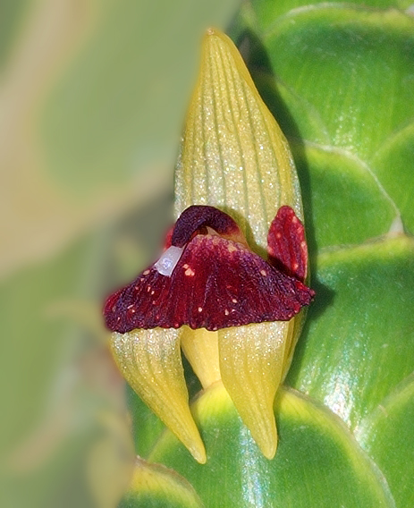 Blütenstand von Zingiber officinale